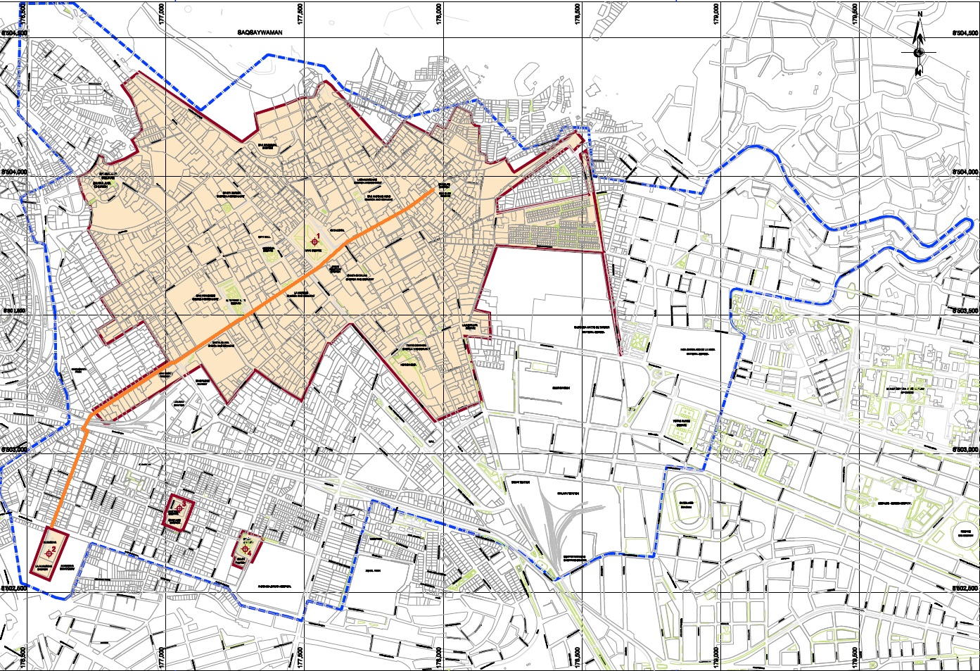 Recorrido del Eje Monumental de la ciudad del Cusco en un plano de la ciudad.